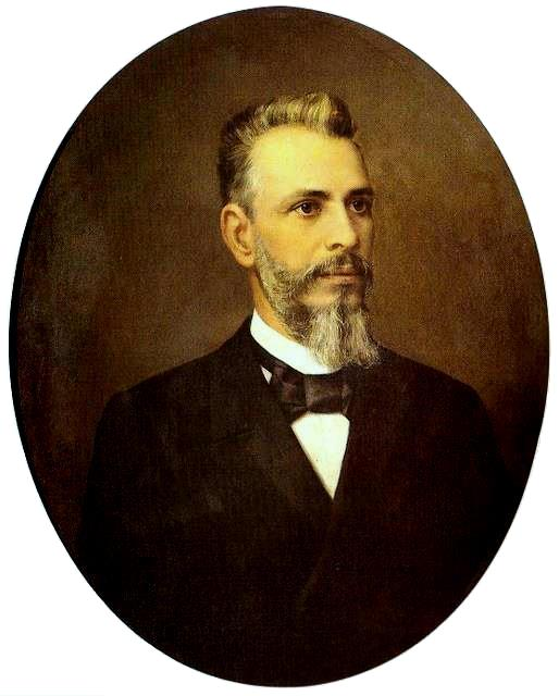 Bernardino de Campos, 1895. Óleo sobre tela, 75 x 65 cm. Acervo da Pinacoteca Municipal de São Paulo, Brasil.